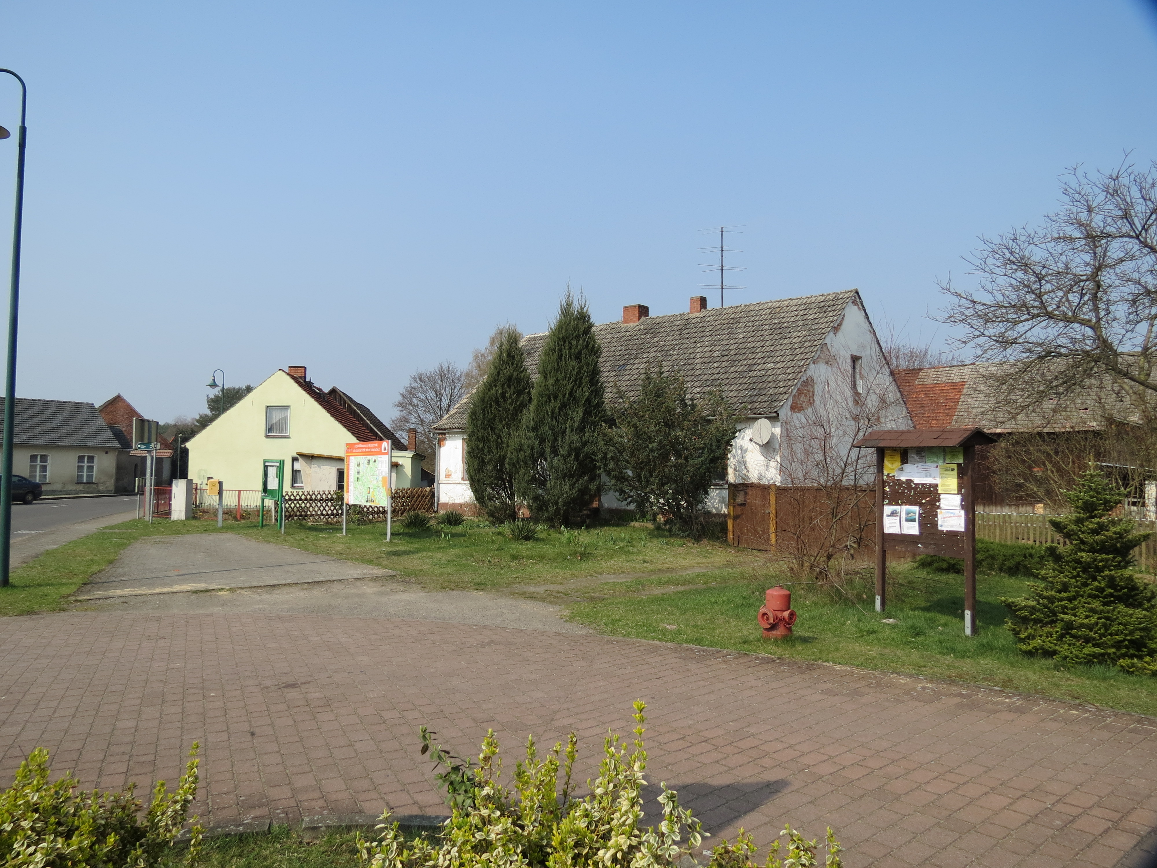 Lamsfeld, Gemeindeteil von Lamsfeld-Groß Liebitz, Ortsteil der Gemeinde Schwielochsee, Landkreis Dahme-Spreewald, Brandenburg, Deutschland